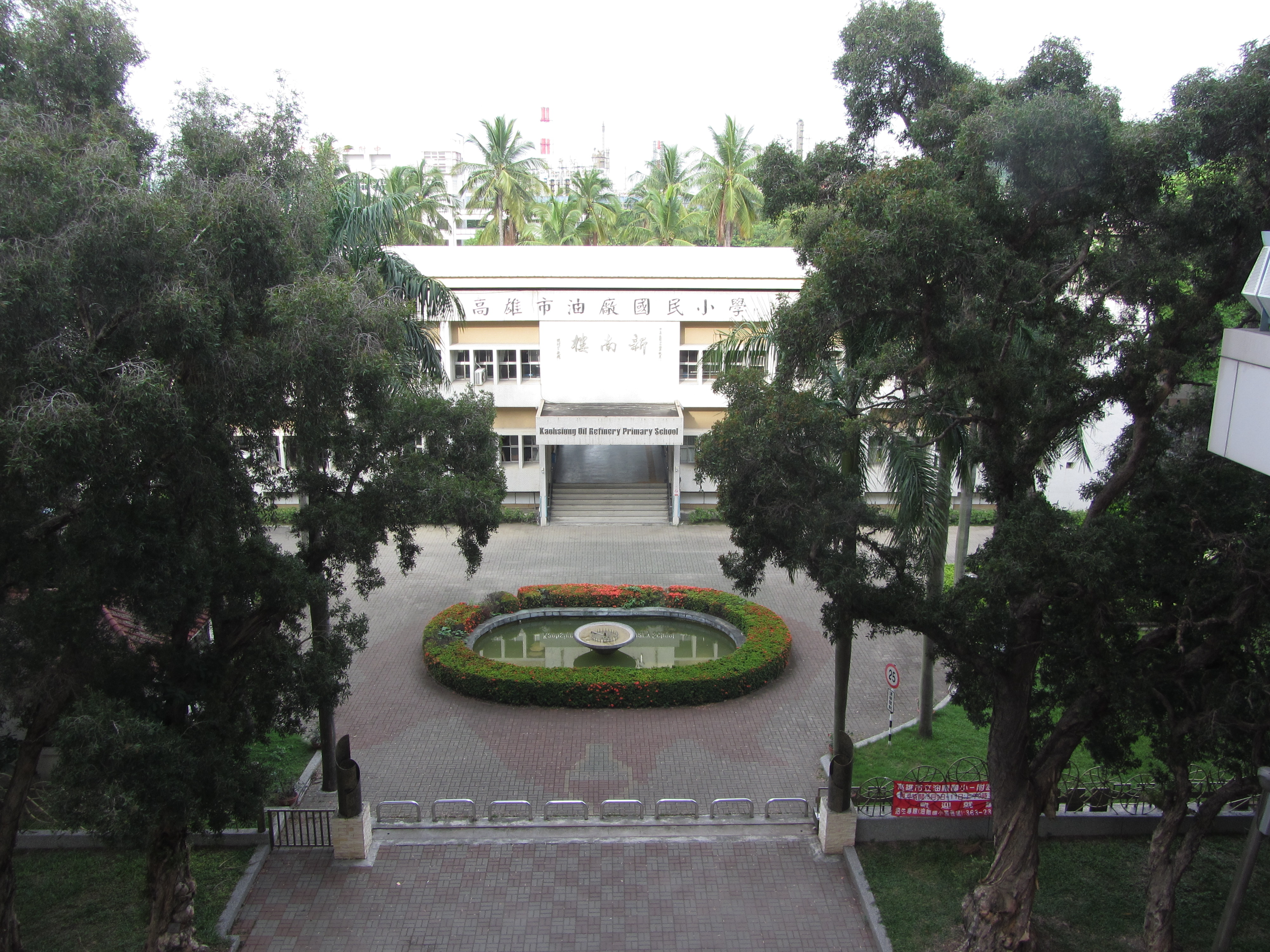 高雄市楠梓區油廠國民小學校舍與校門。